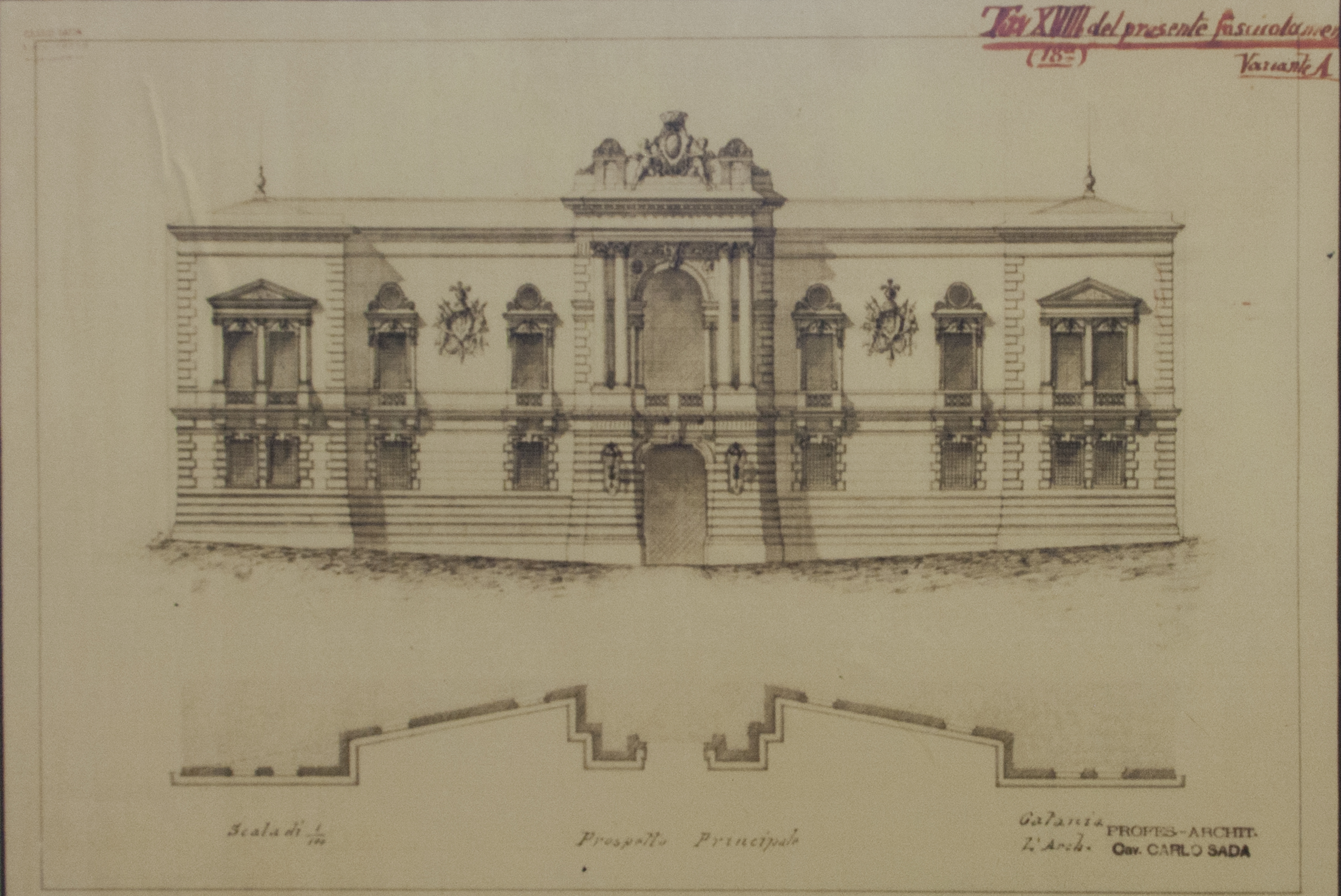 Disegnato dall'arch. Carlo Sada ma mai attuato